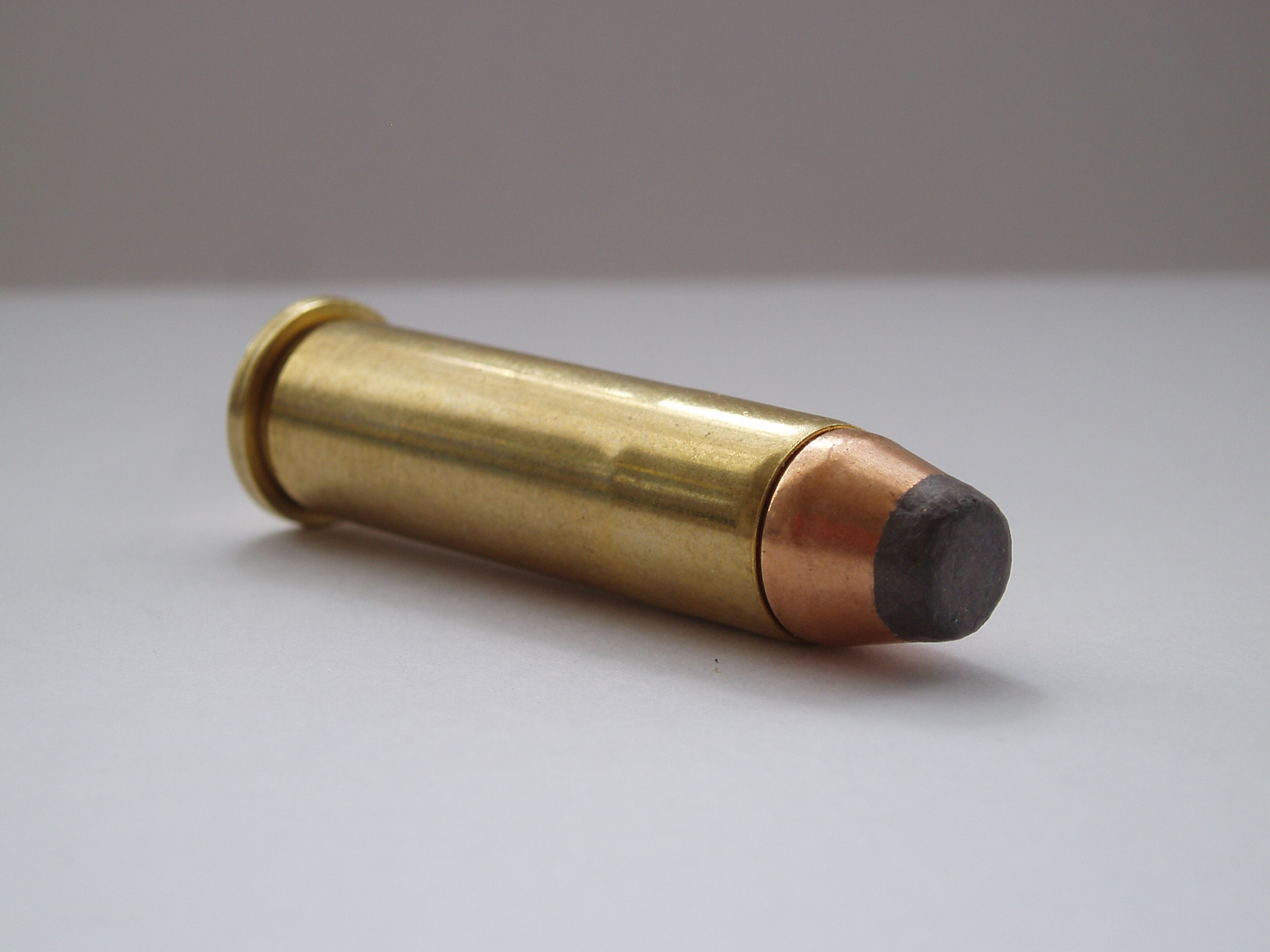 .357 revolver cartrdige. SP bullet. Manufacturer: Sellier & Bellot.